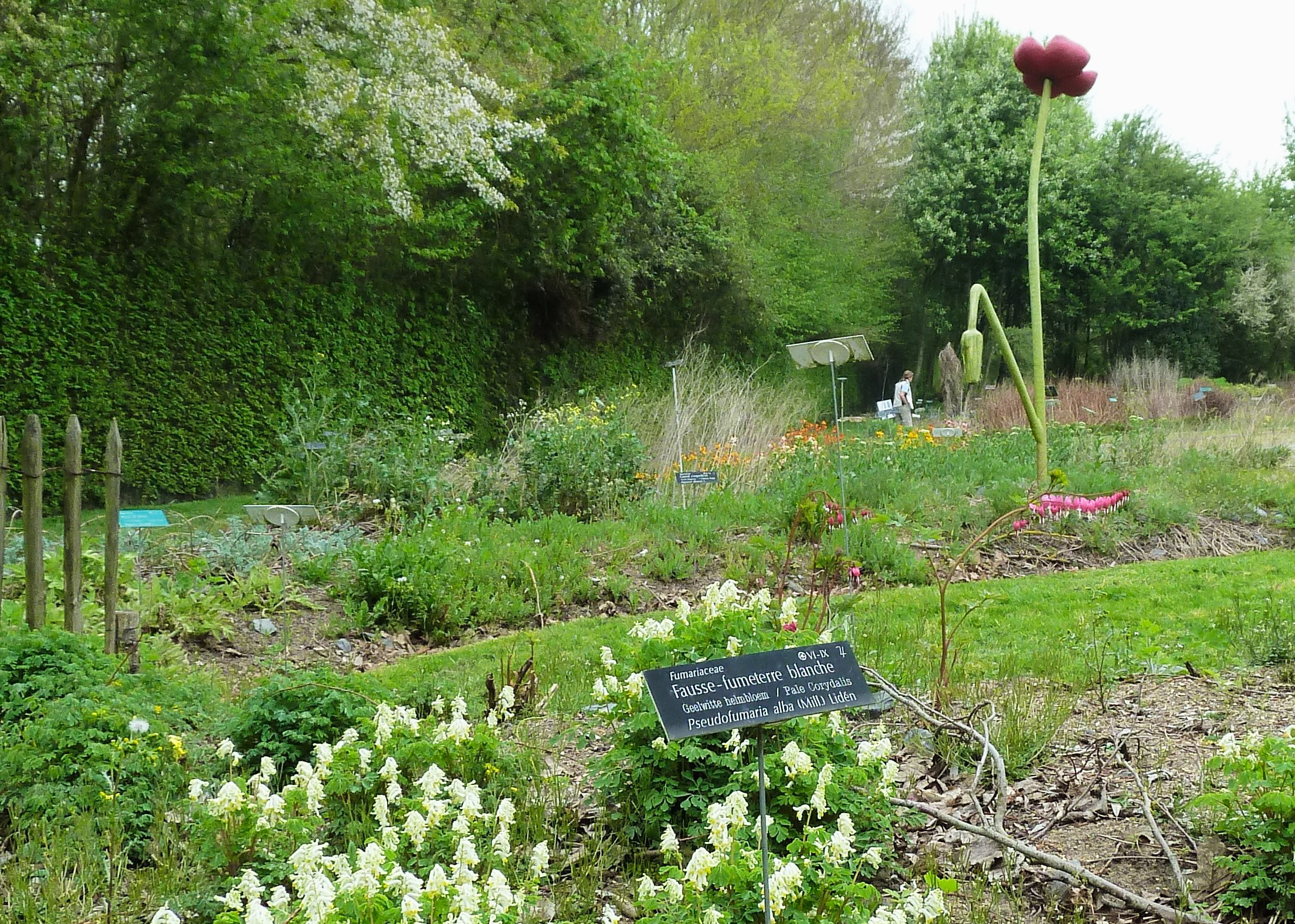 Pseudofumaria alba Conservatoire botanique national Bailleul Nord, France